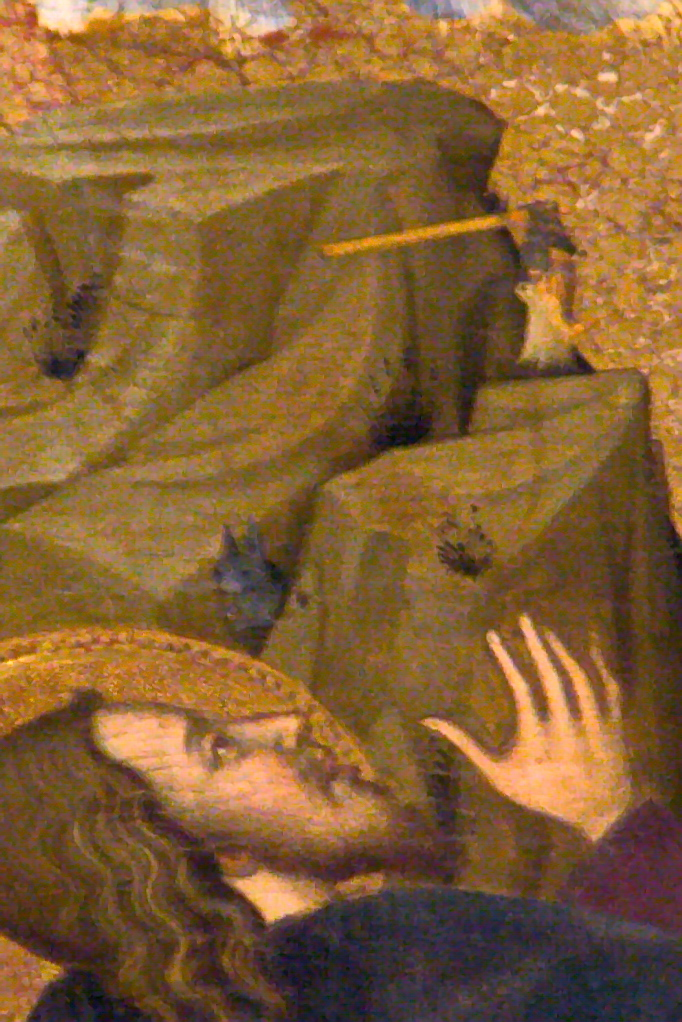 Retaule del Sant Esperit de la Seu de Manresa. Detall de la taula de la Transfiguració.